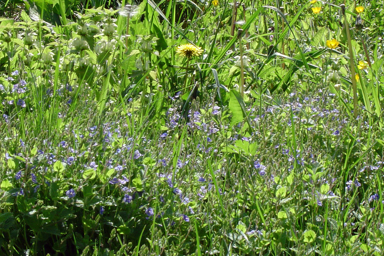 Bloemen in een kruidenrijk, 'verwaarloosd' weiland, zoals witte dovenetel, gewone ereprijs, scherpe boterbloem, paardenbloem.